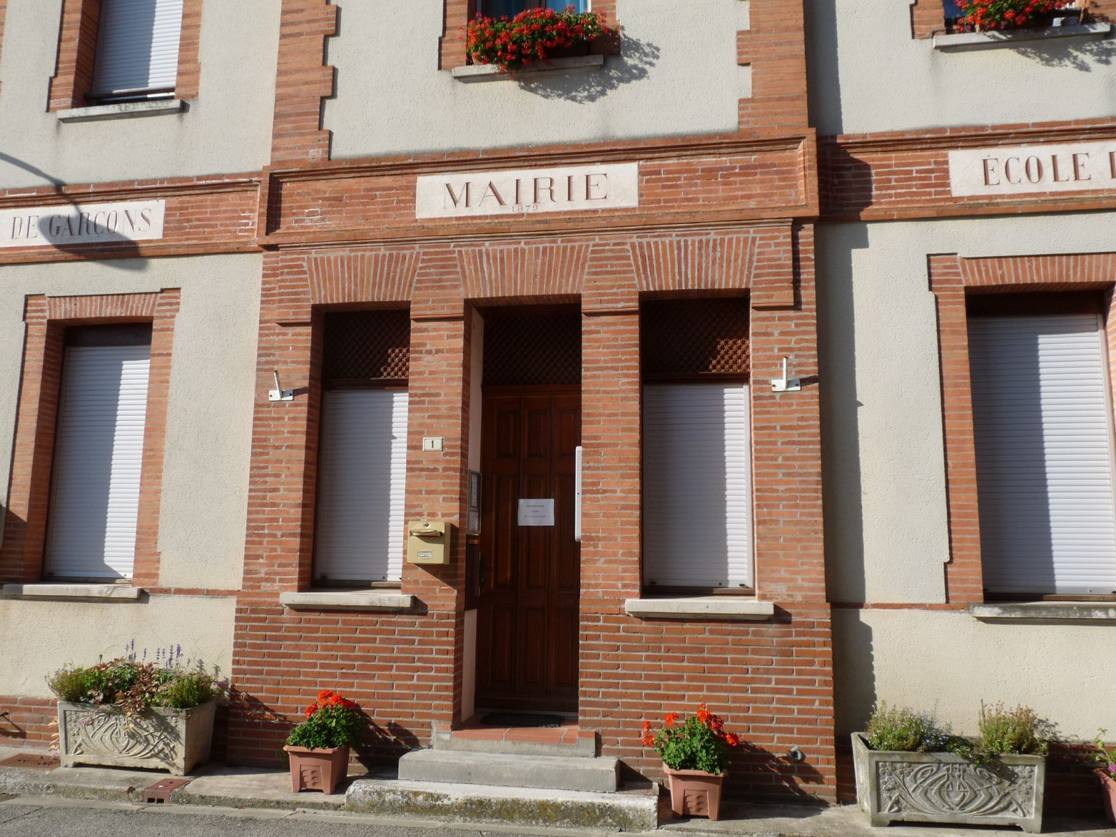 Mairie d'Auragne, Haute-Garonne, France